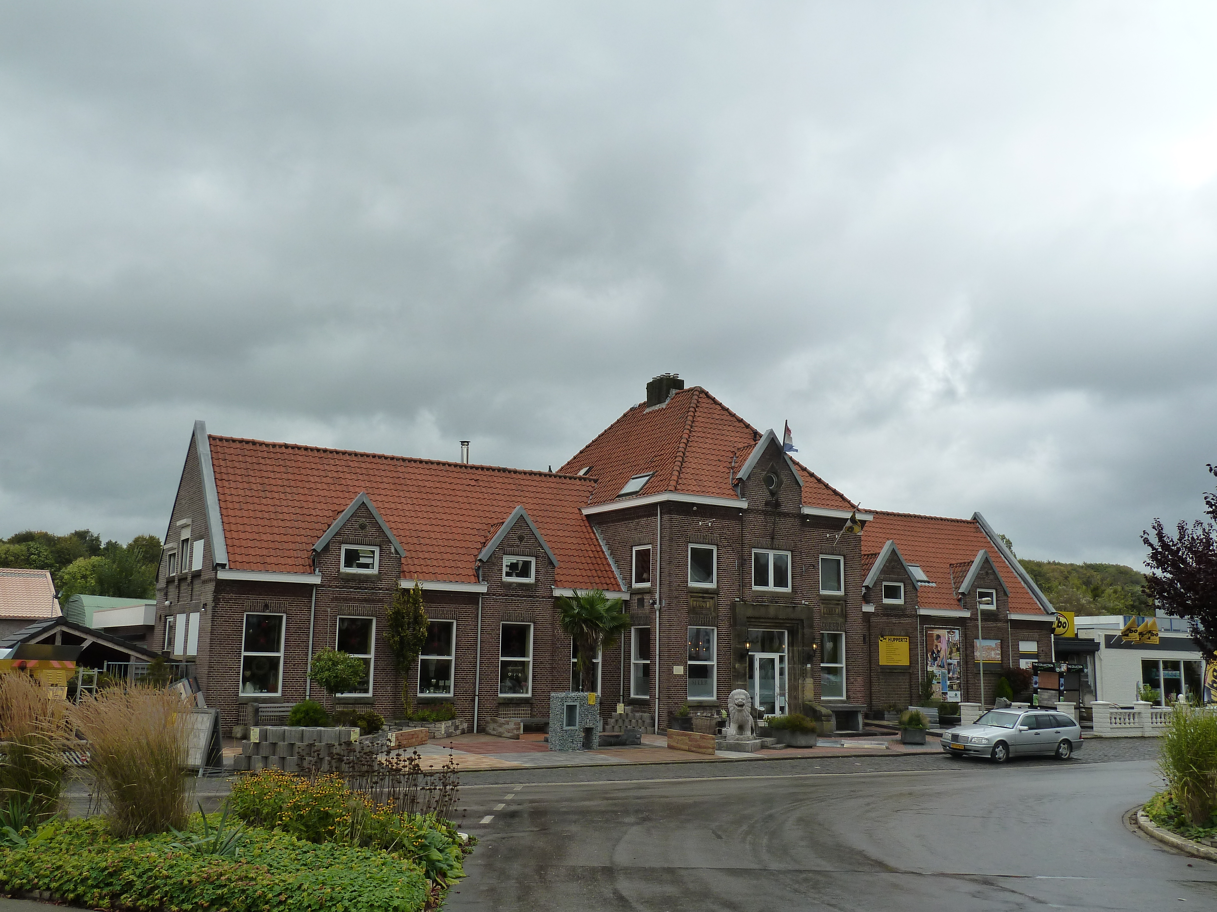 Station Vaals, onderdeel van de opgeheven tramlijn Maastricht-Vaals, Limburg, Nederland